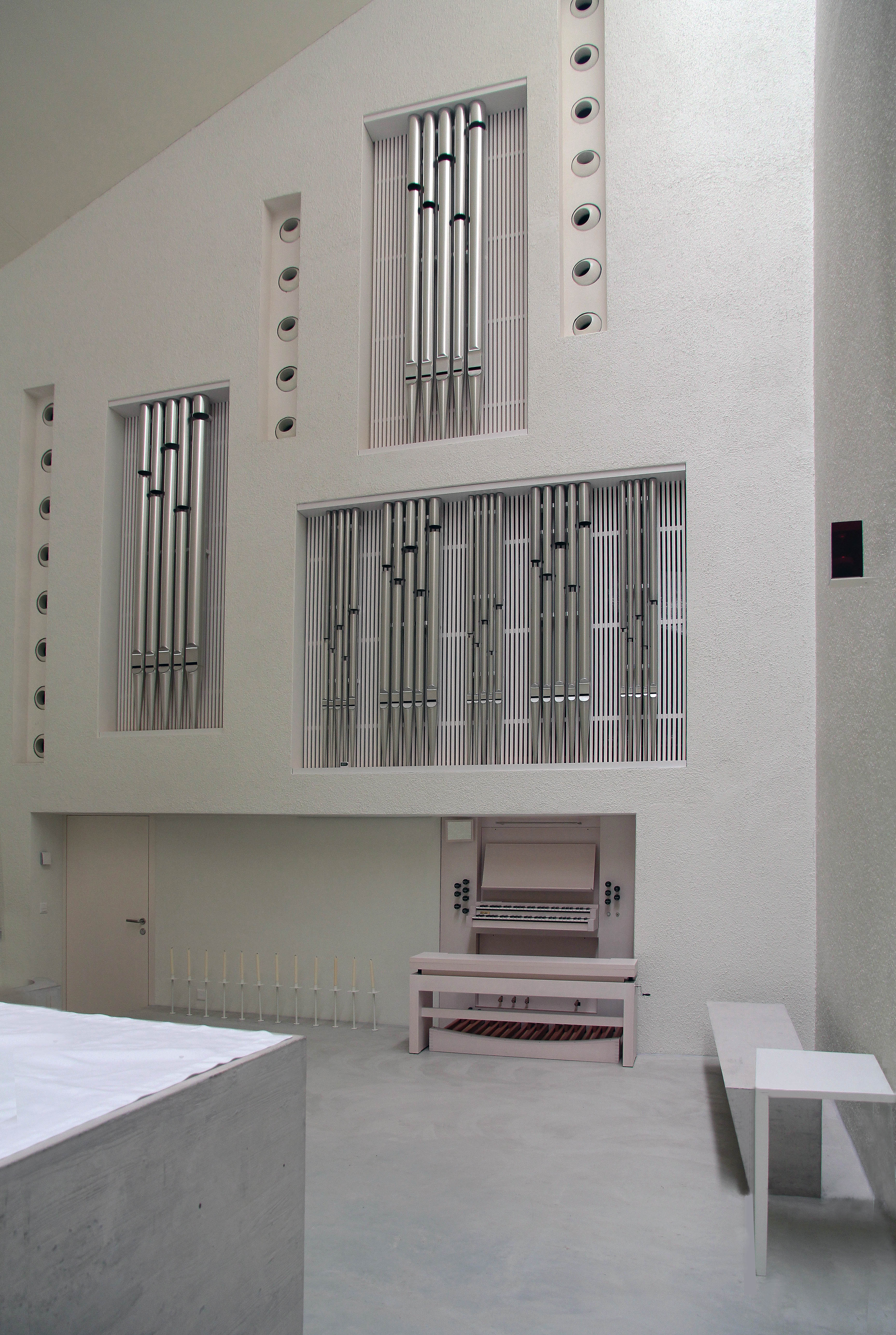 Römisch-katholische Kirche St. Franziskus Uetikon, Orgel